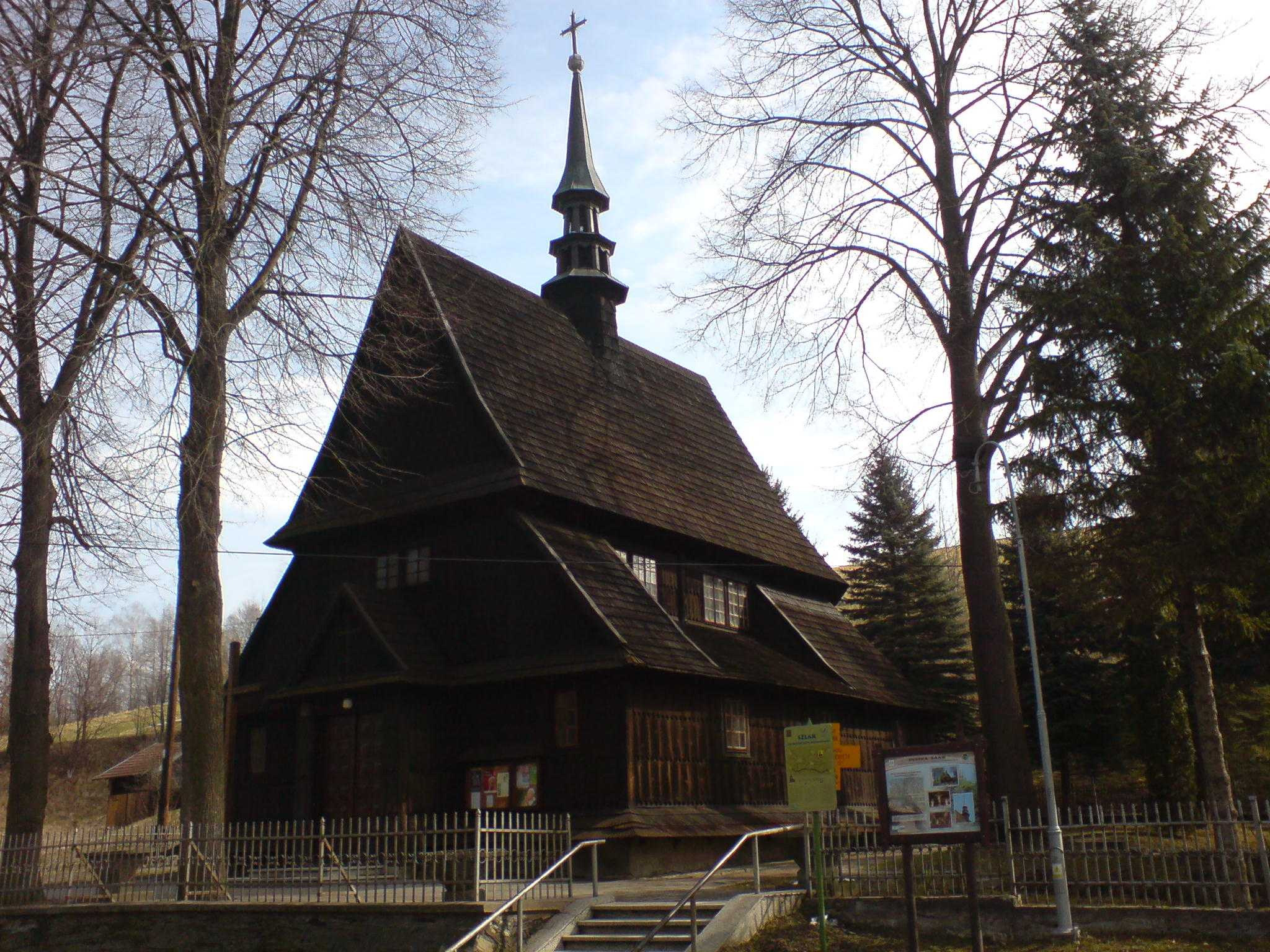 kościół w Jabłonce